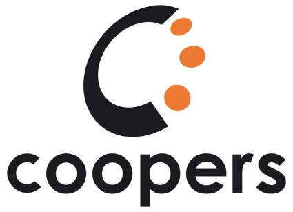 Logo von Coopers Projekt